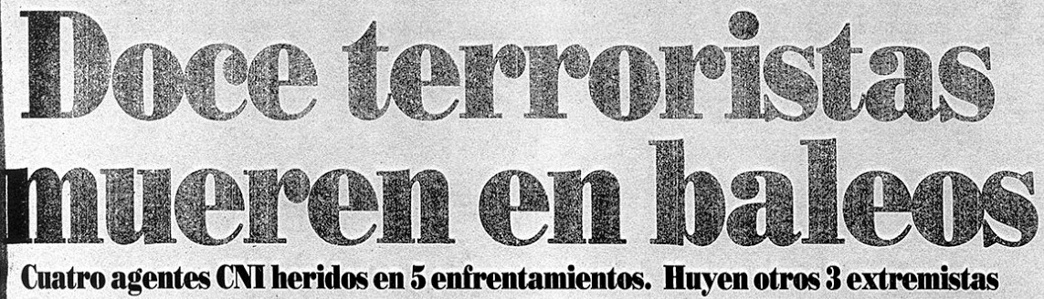 Portada del diario "La Tercera" donde informan la muerte de 12 terroristas en supuestos enfrentamientos. La Operación Albania o "Matanza de Corpus Christi"​ se produjo entre los días 15 y 16 de junio de 1987, en Chile. En ella doce miembros del Frente Patriótico Manuel Rodríguez (FPMR) murieron a manos de agentes de la Central Nacional de Informaciones (CNI). Estos hechos fueron presentados por las autoridades como un supuesto "enfrentamiento".